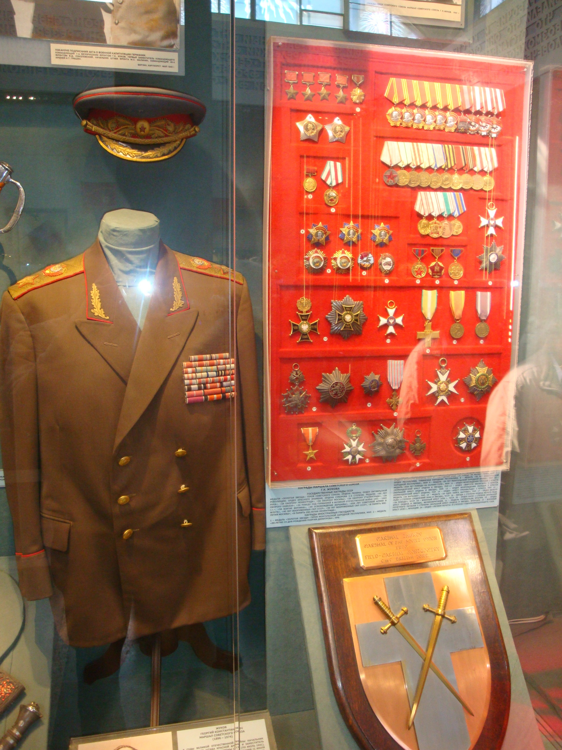 Китель Жукова и его награды